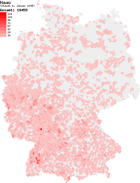 Verteilung des Nachnamens Haas in Deutschland nach dem Telefonbuch mit Stand vom 6. Januar 2005